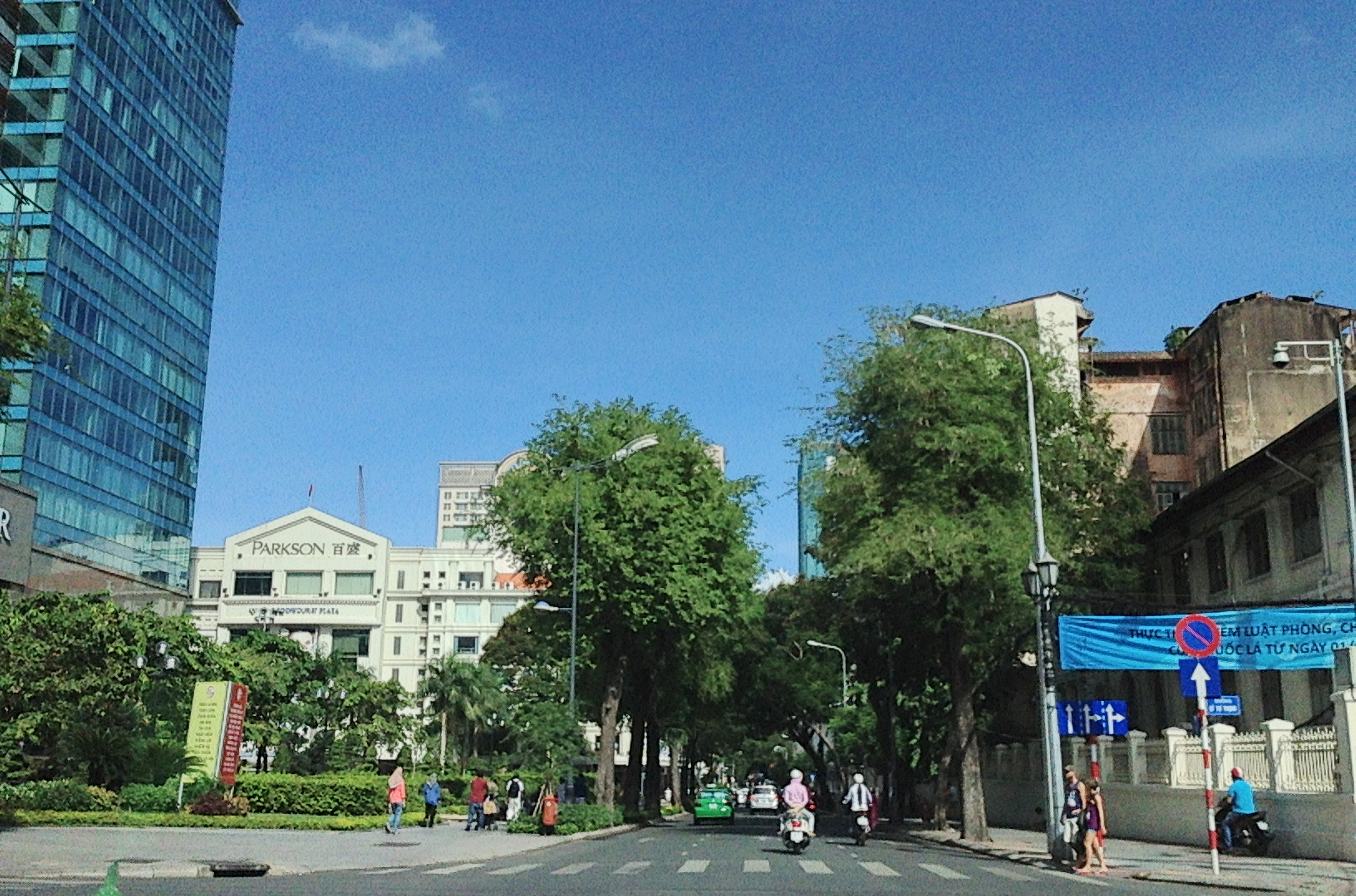 Đồng khởi,Bến nghé, q 1, hcmvn